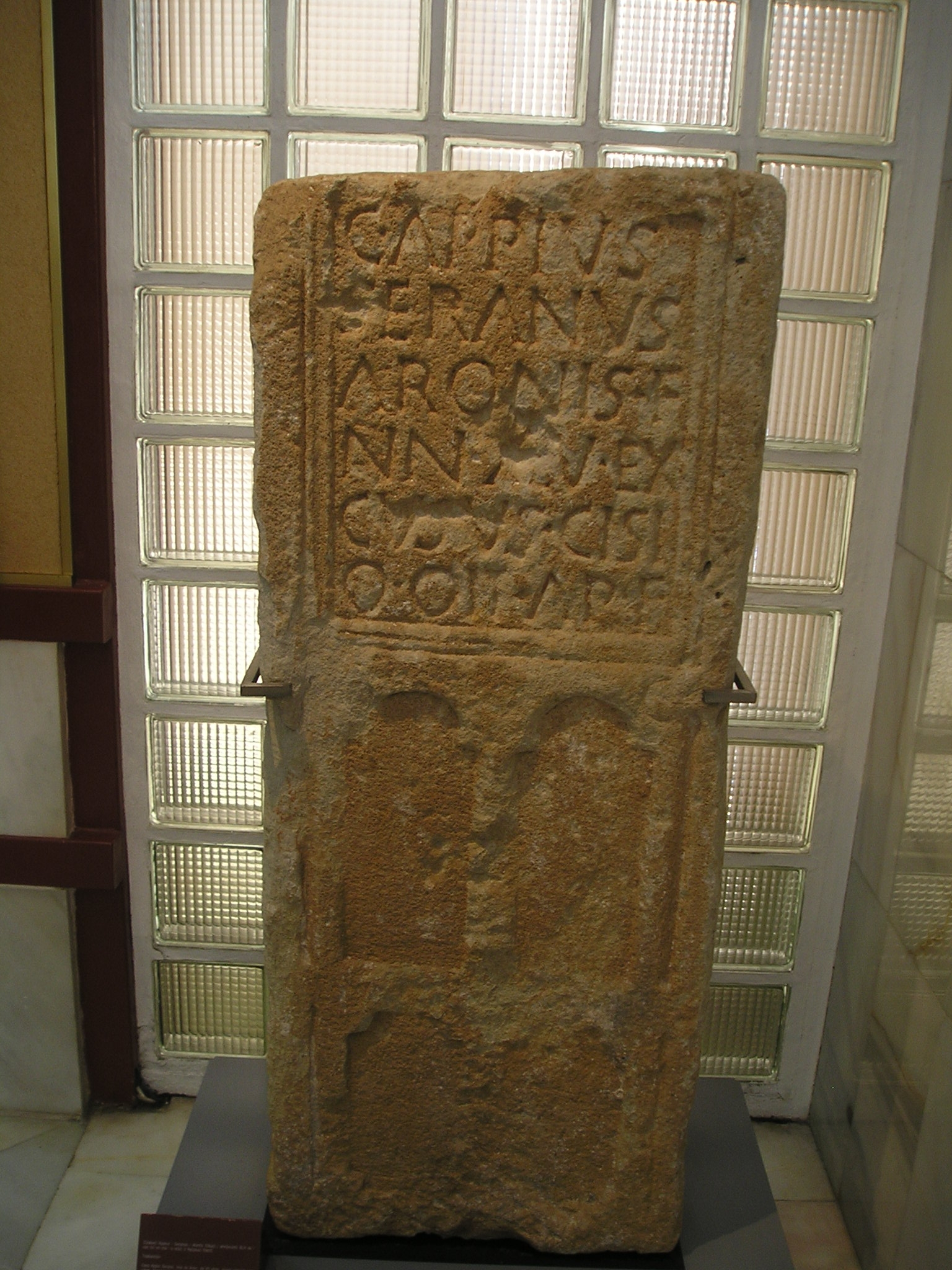 Inscripción fuenraia romana procedente de Fuentetecha (Soria, españa), depositada en el Museo Numantino en Soria, correspondiente con la inscripción ERPSoria 60: C(aius) Appius/ Seranus/ Aronis f(ilius)/ ann(orum) XLV Ex/cusus Cisi/o OIT AP(pii?) f(ecit)